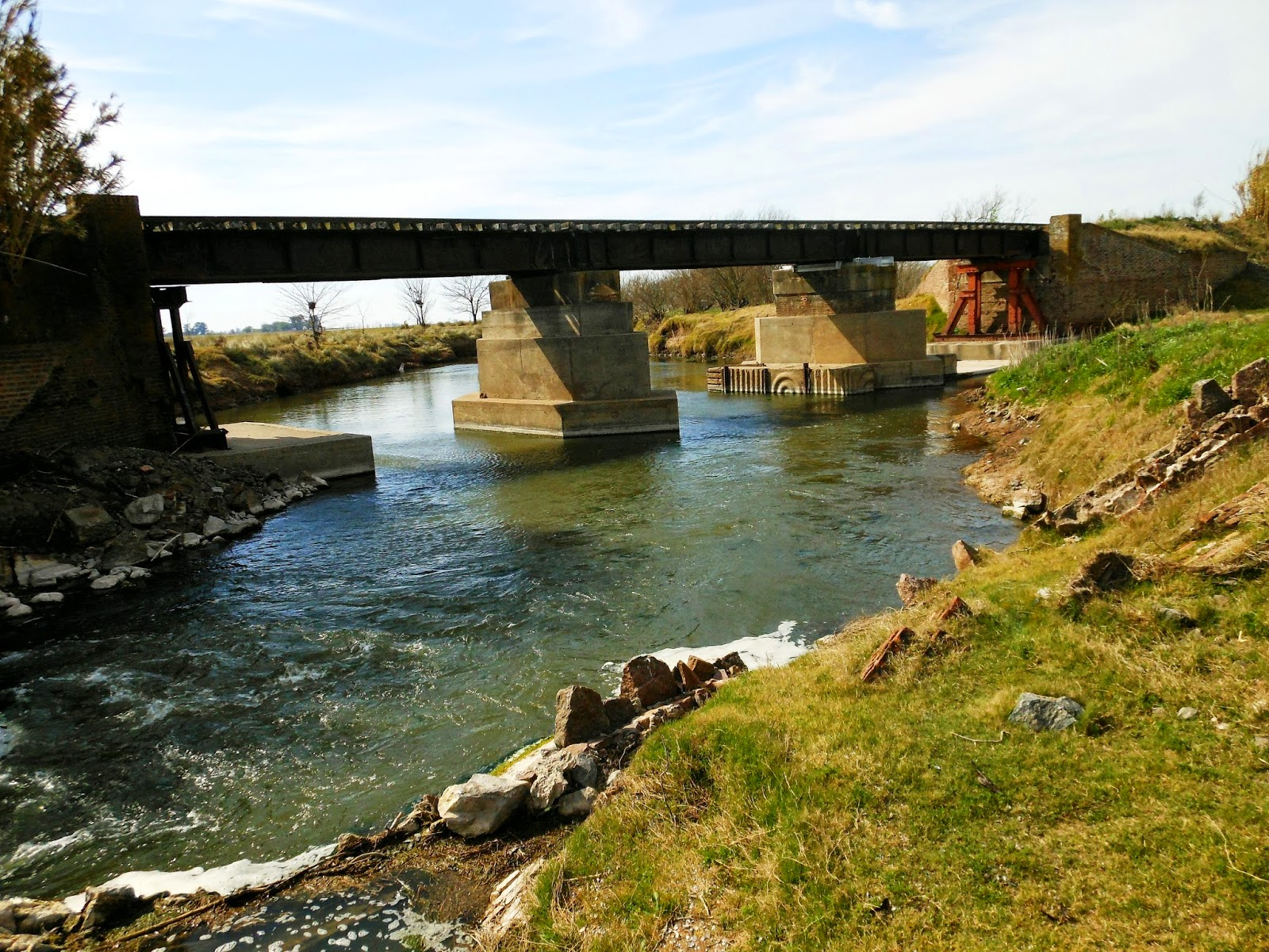 Puente ferroviario que se encuentra en el pueblo Arroyo del Medio. Pasa por arriba del arroyo de mismo nombre